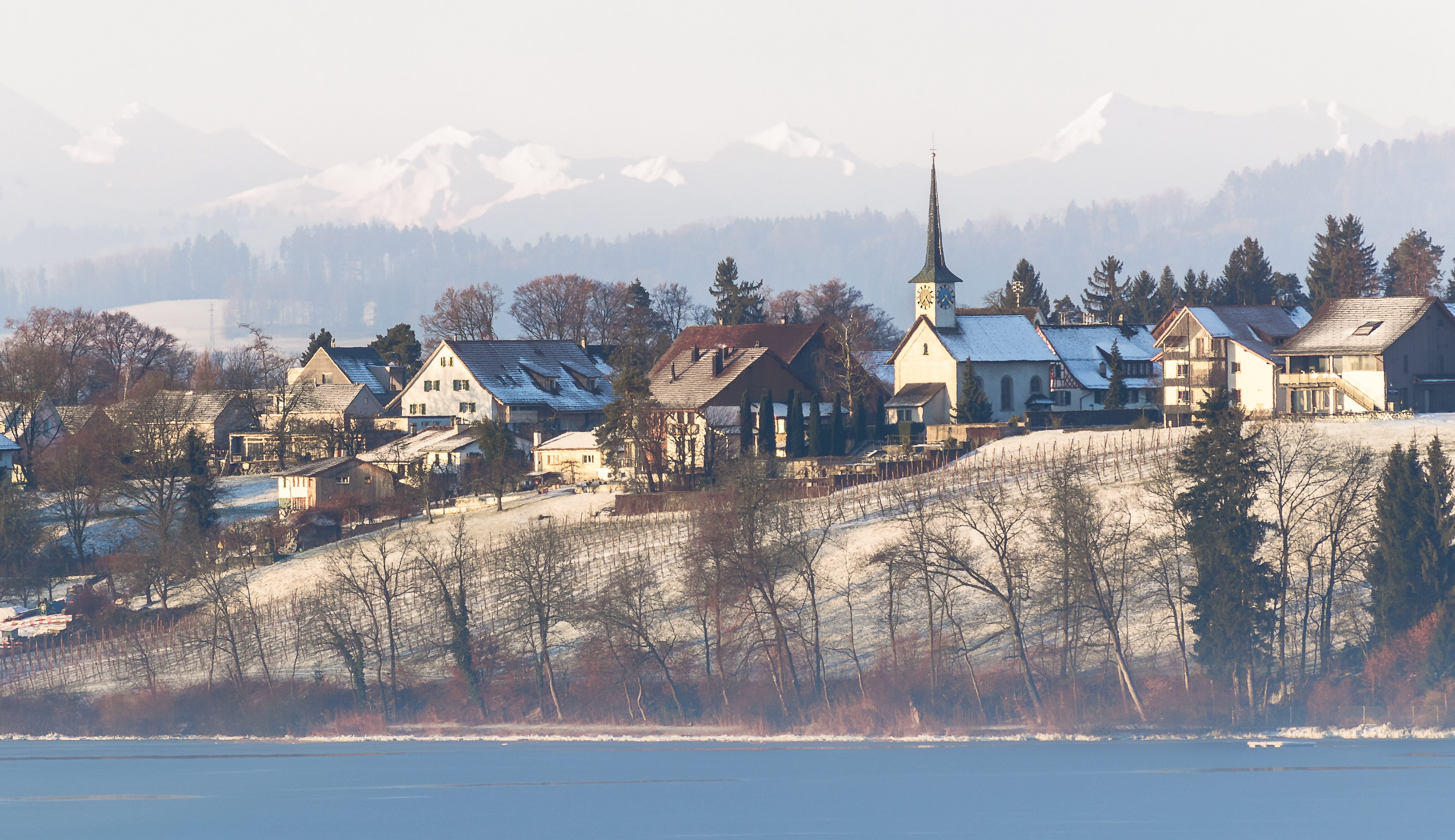 Blick auf die Gemeinde Seegräben im Kanton Zürich über den Pfäffikersee.